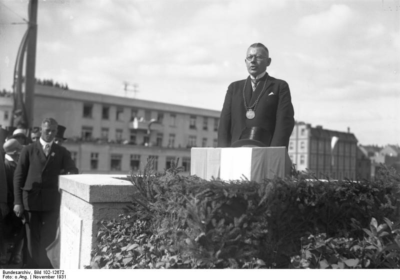 Der Brandenburger Oberbürgermeister Dr. Fresdorf ist in den Stadtrat von Köln a/Rh. gewählt worden. Der verdienstvolle Brandenburger Oberbürgermeister wurde an Stelle des ausgeschiedenen Bürgermeisters Metzerath zum ersten Beigeordneten der Stadt Köln a/Rh. gewählt.